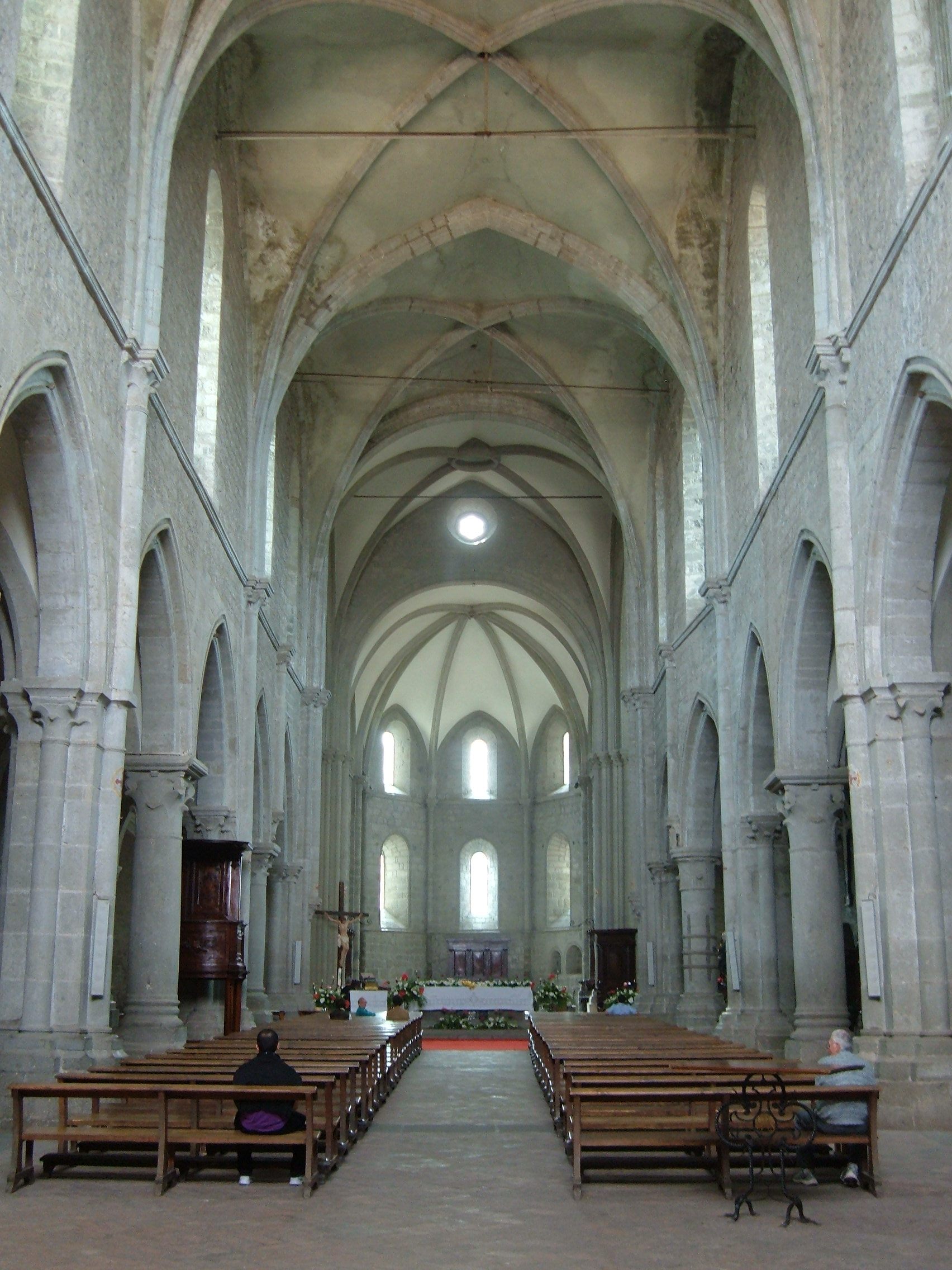 Interno, navata centrale